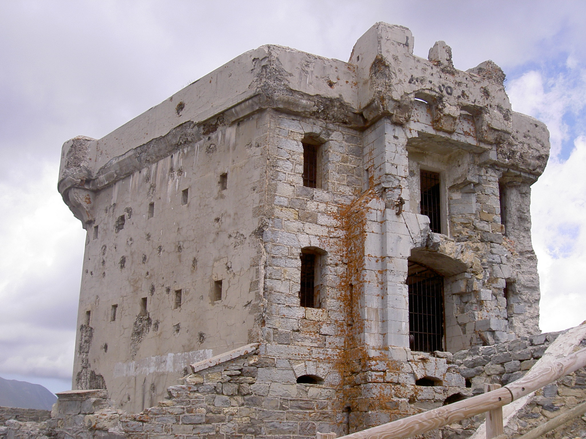 La Redoute (2080 m) Authion été 2005 photo prise par G.Bertothy